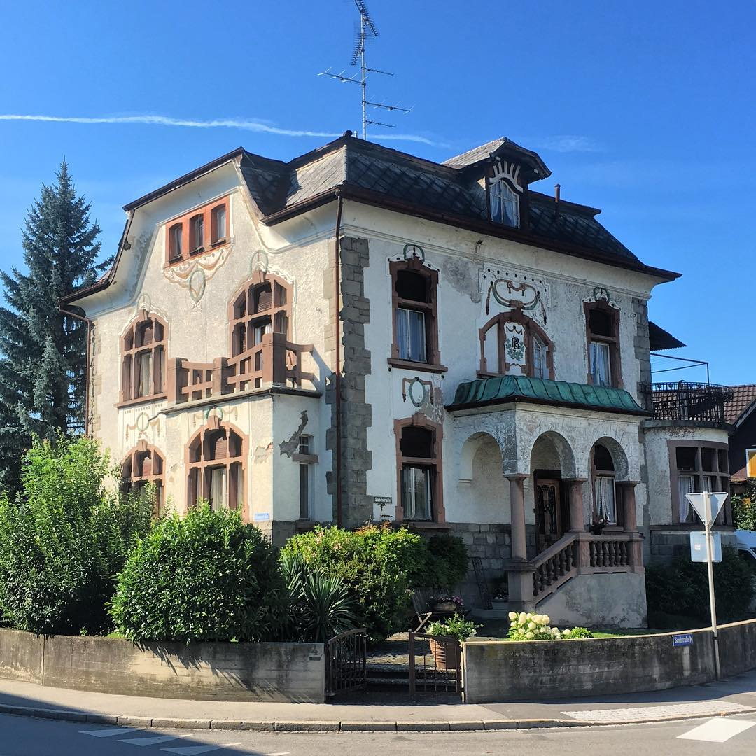 Jugendstilvilla Robert Bösch in Lustenau. Erbaut 1906 von Rudolf Bösch, unter Denkmalschutz seit 2014.